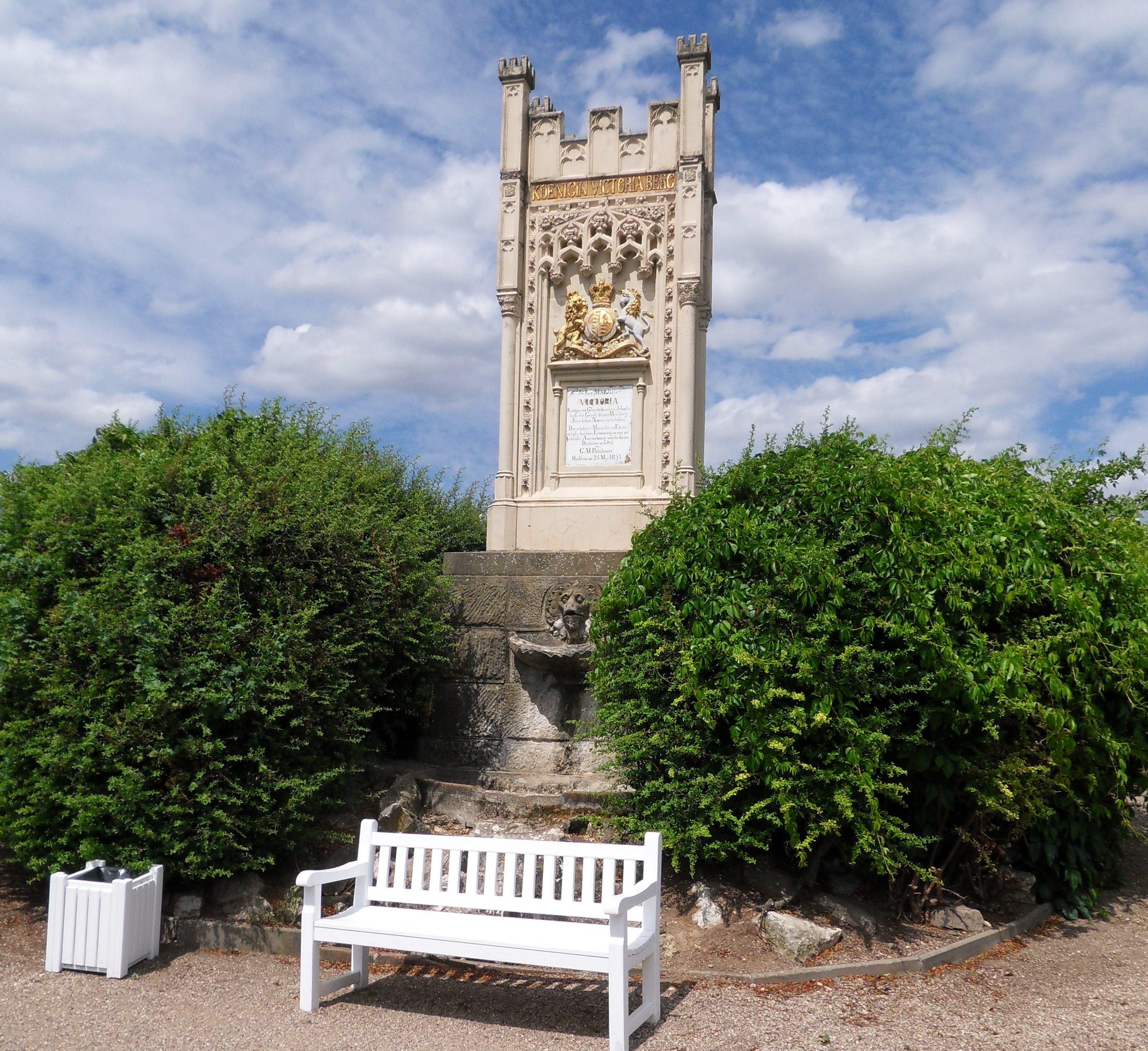 Südseite des Königin-Viktoria-Denkmals in den Weinbergen der Stadt Hochheim am Main